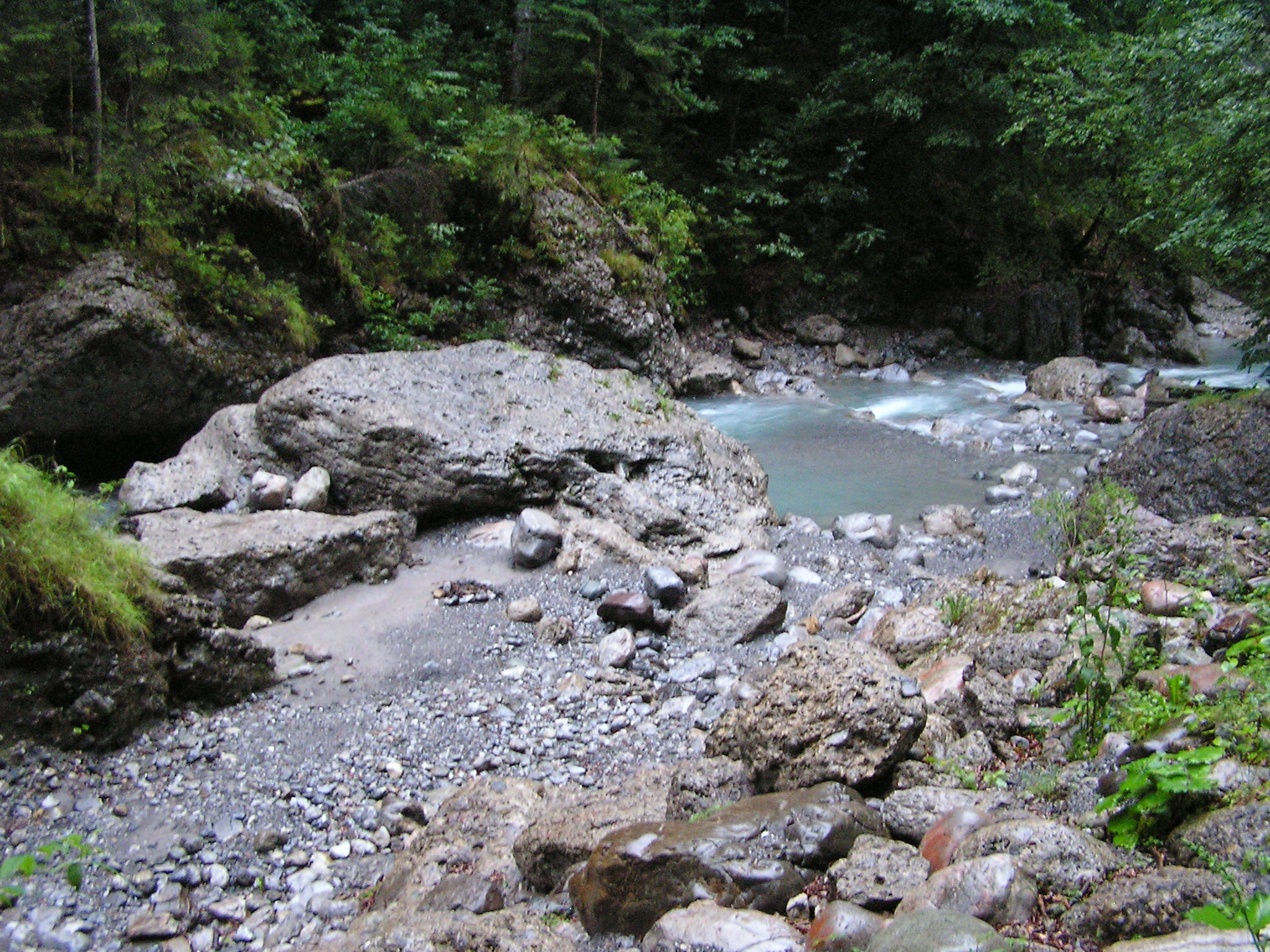 Bürs Schlucht (Alvierbach), ca. 600 m NN, Bürser Konglomerat erkennbar. Ort & Datum: August 2005